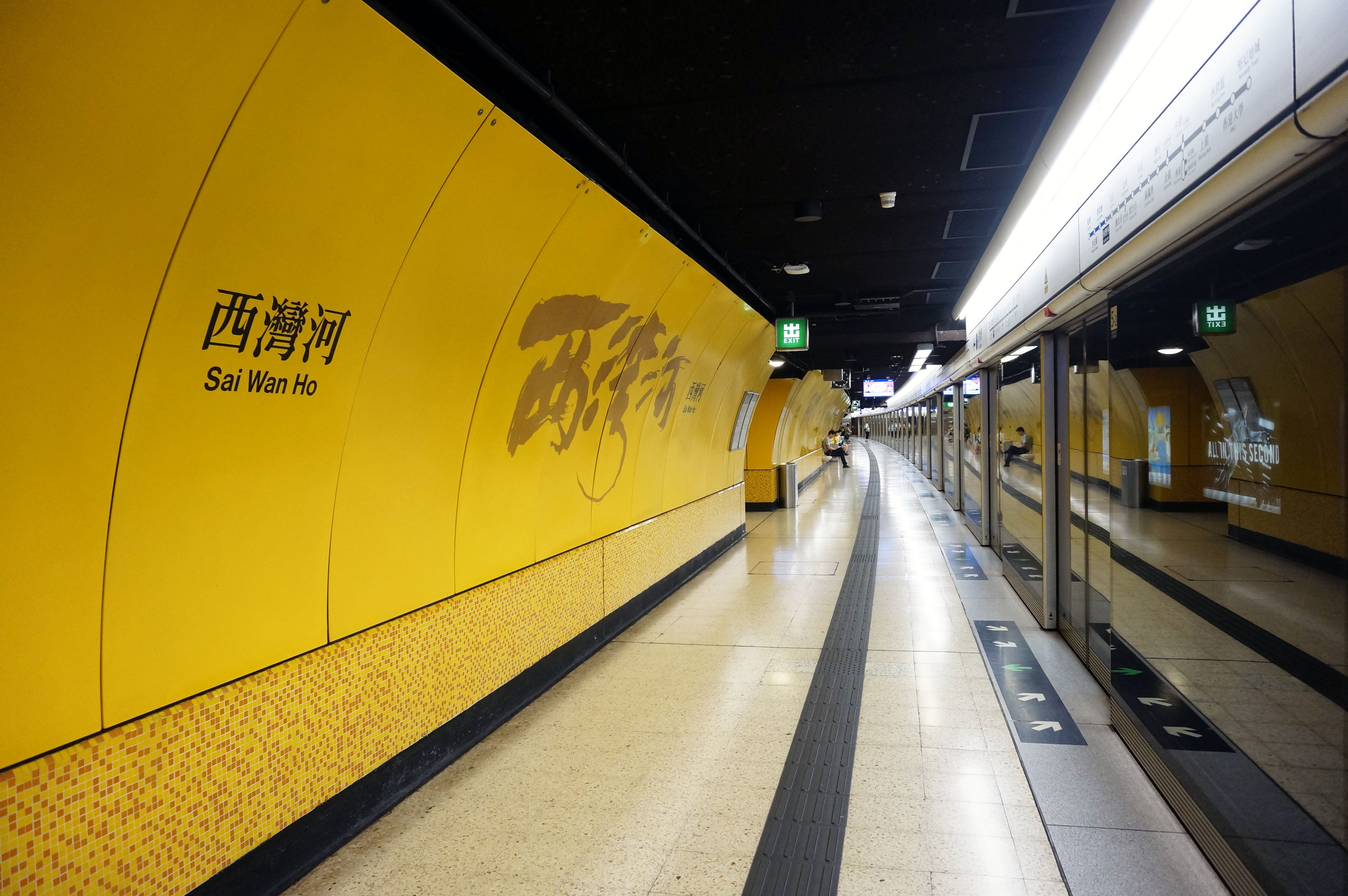 港鐵西灣河站月台